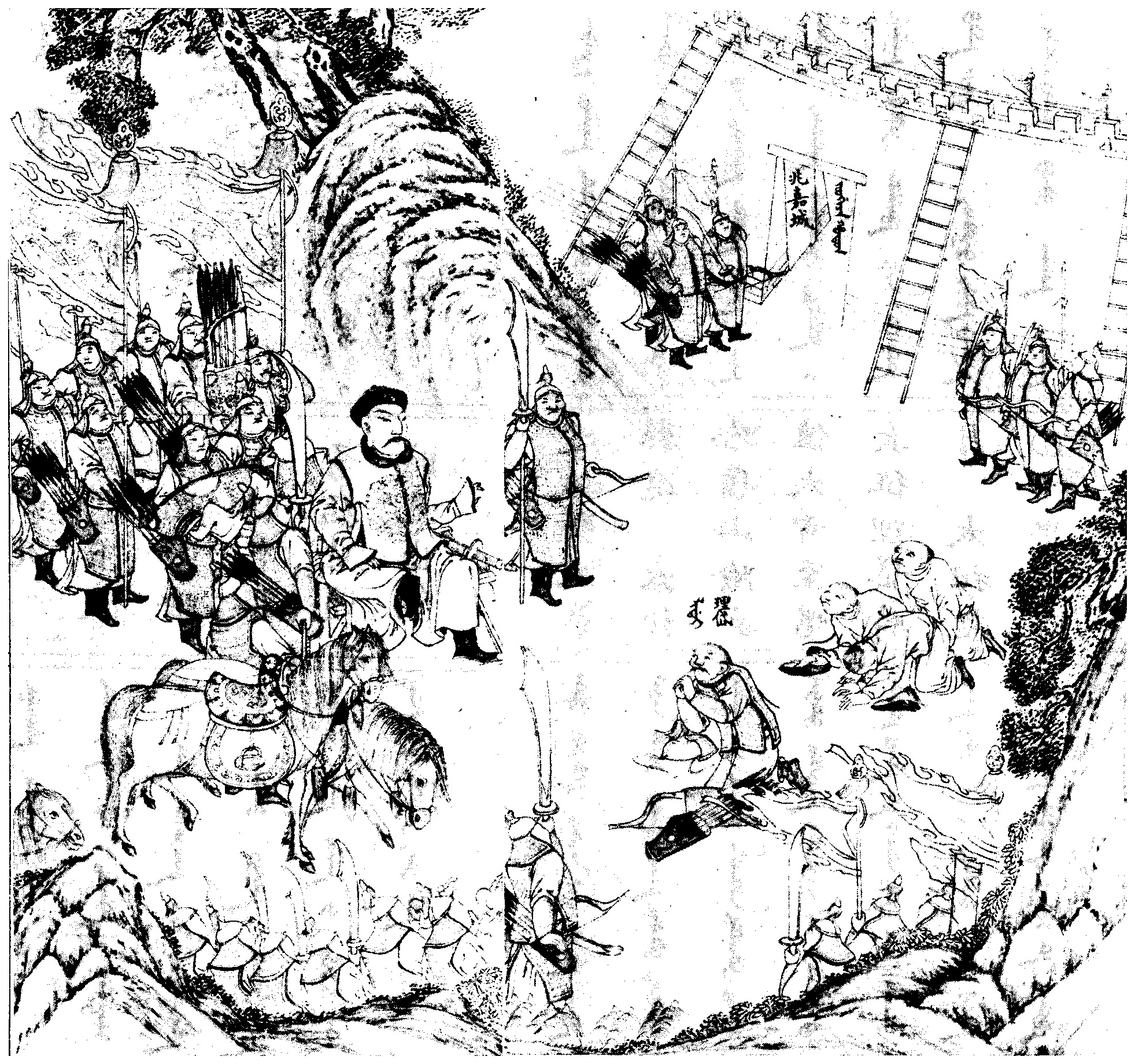 中文（台灣）: 弩尔哈齐宥養理岱